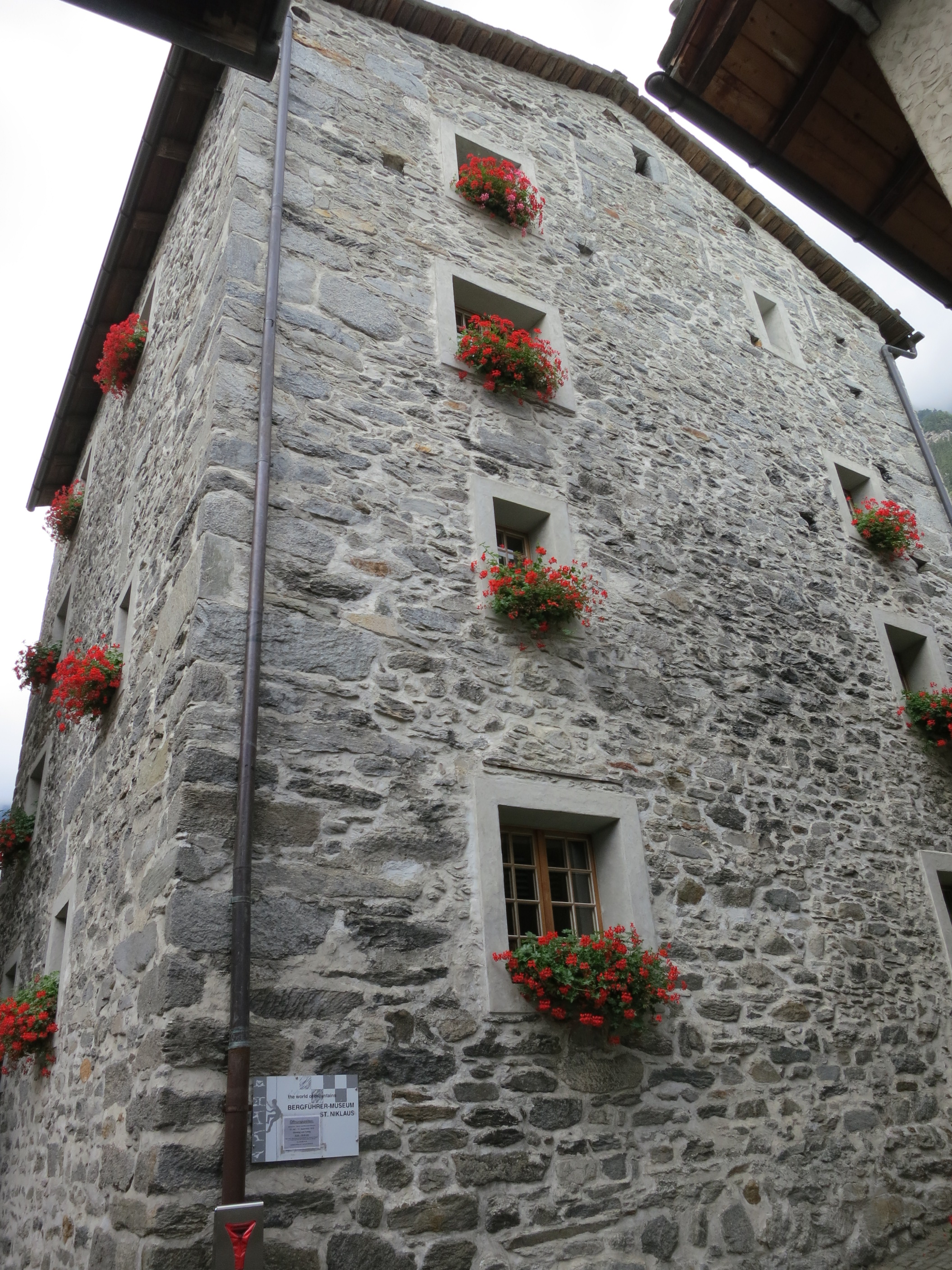 Meierturm, St. Niklaus VS, Schweiz